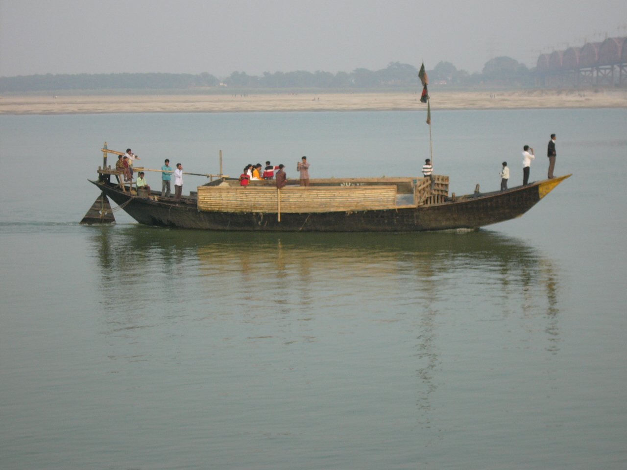 Boat Bangladesh